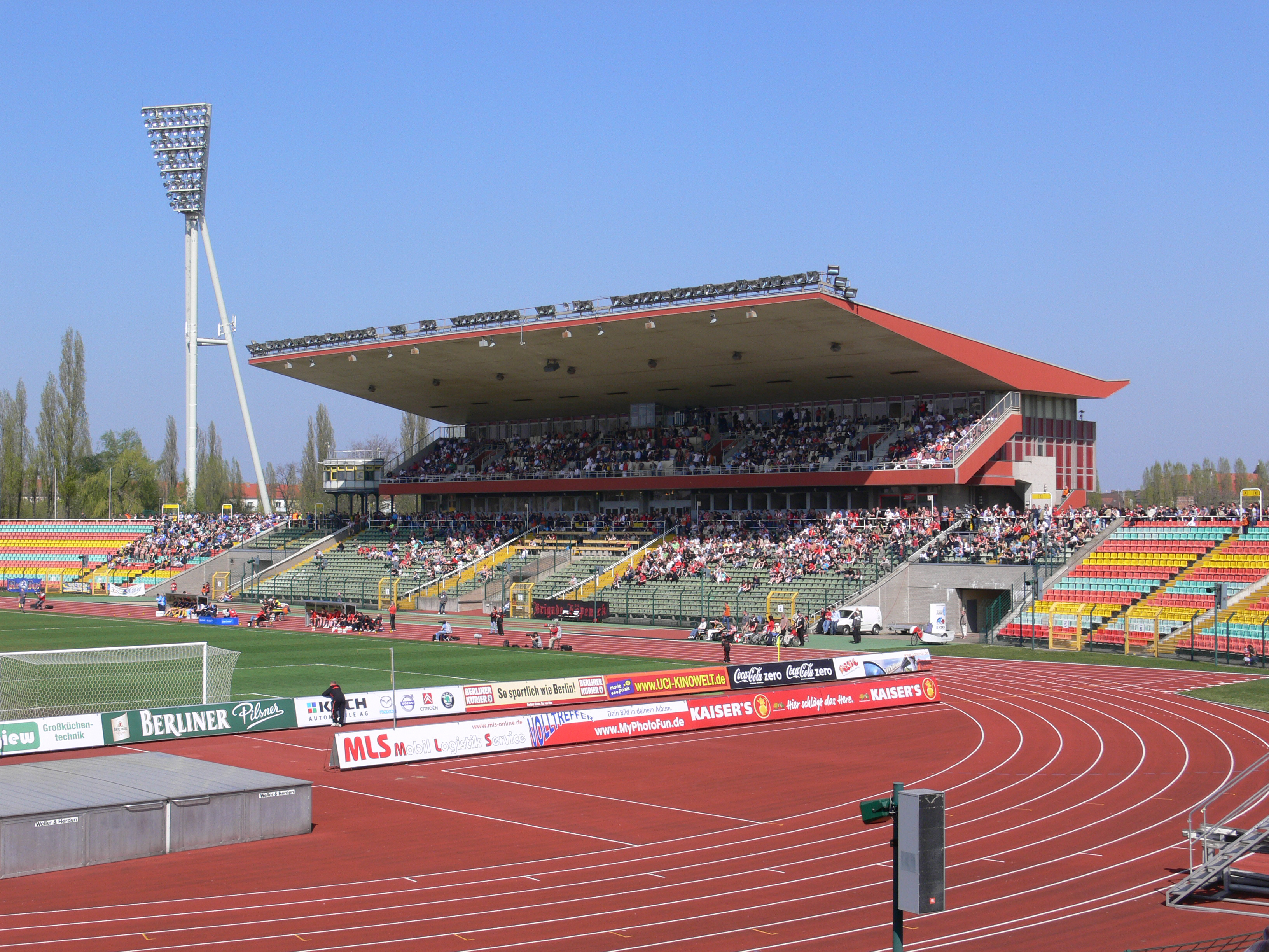 Berlin, Prenzlauer Berg, Friedrich-Ludwig-Jahn-Sportpark beim Spiel 1. FC Union Berlin – Stuttgarter Kickers